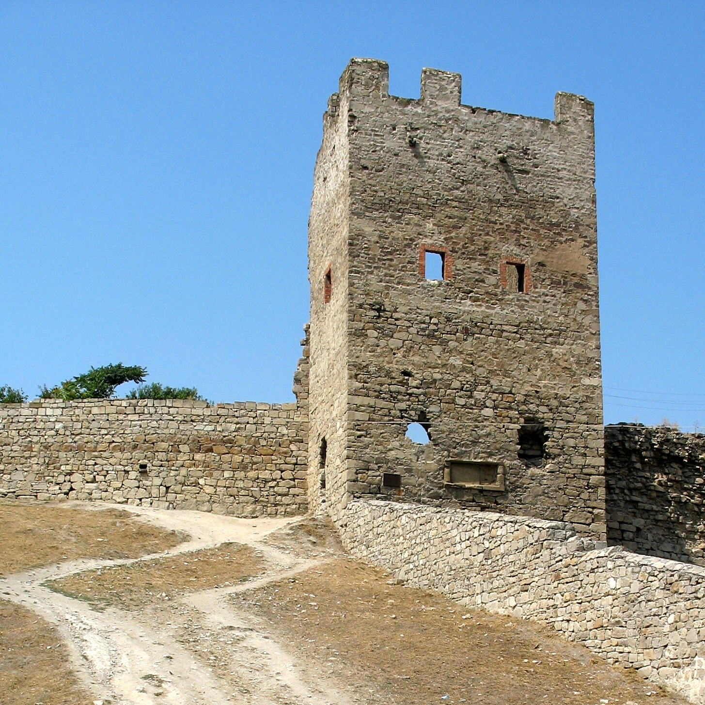 Башня Криско: Феодосия, Крым This object is located on the Crimean Peninsula and recognized as cultural heritage by Russia under the monument ID: 8231387002. The legal status of the Crimean region is currently disputed.